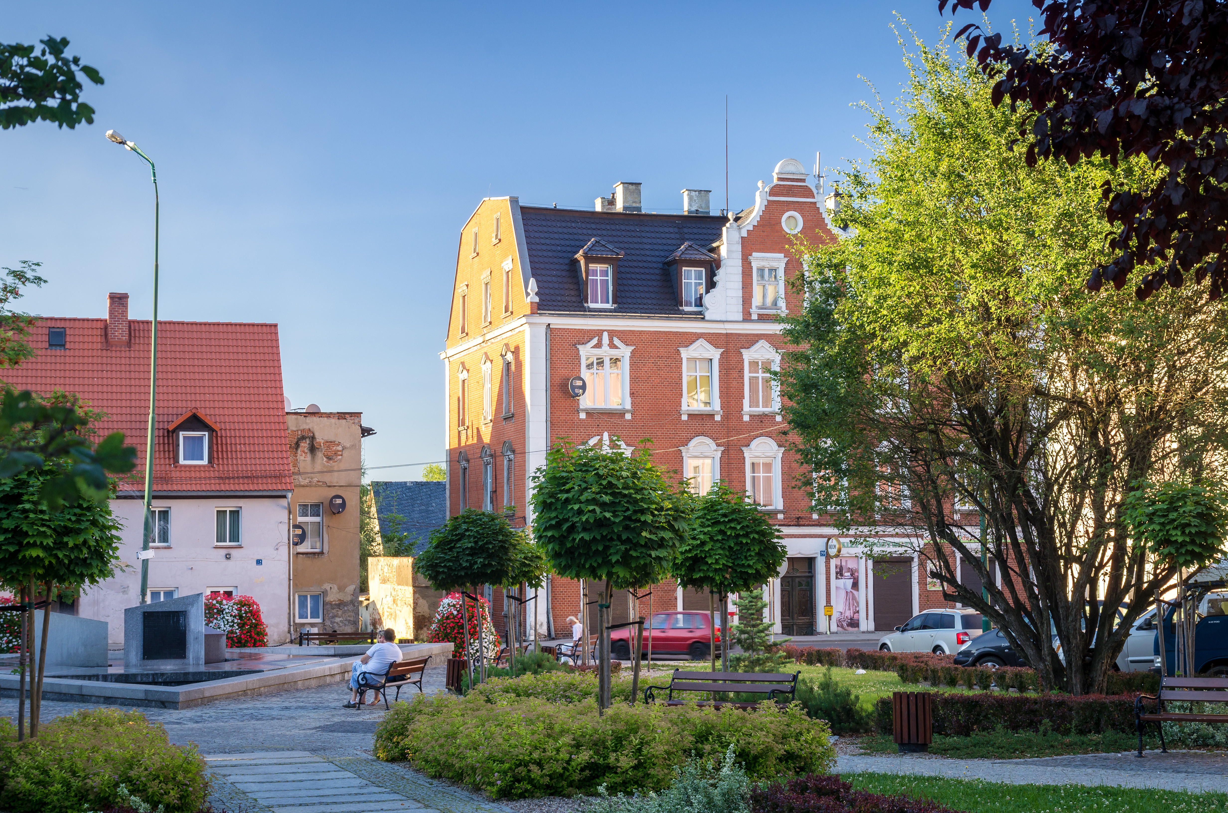 Piława Górna - Pl. Piastów Śląskich This photo of Lower Silesian Voivodeship was taken during Wikiexpedition 2013 set up by Wikimedia Polska Association.You can see all photographs in category Wikiekspedycja 2013.